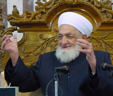 مفتي سوريا السابق